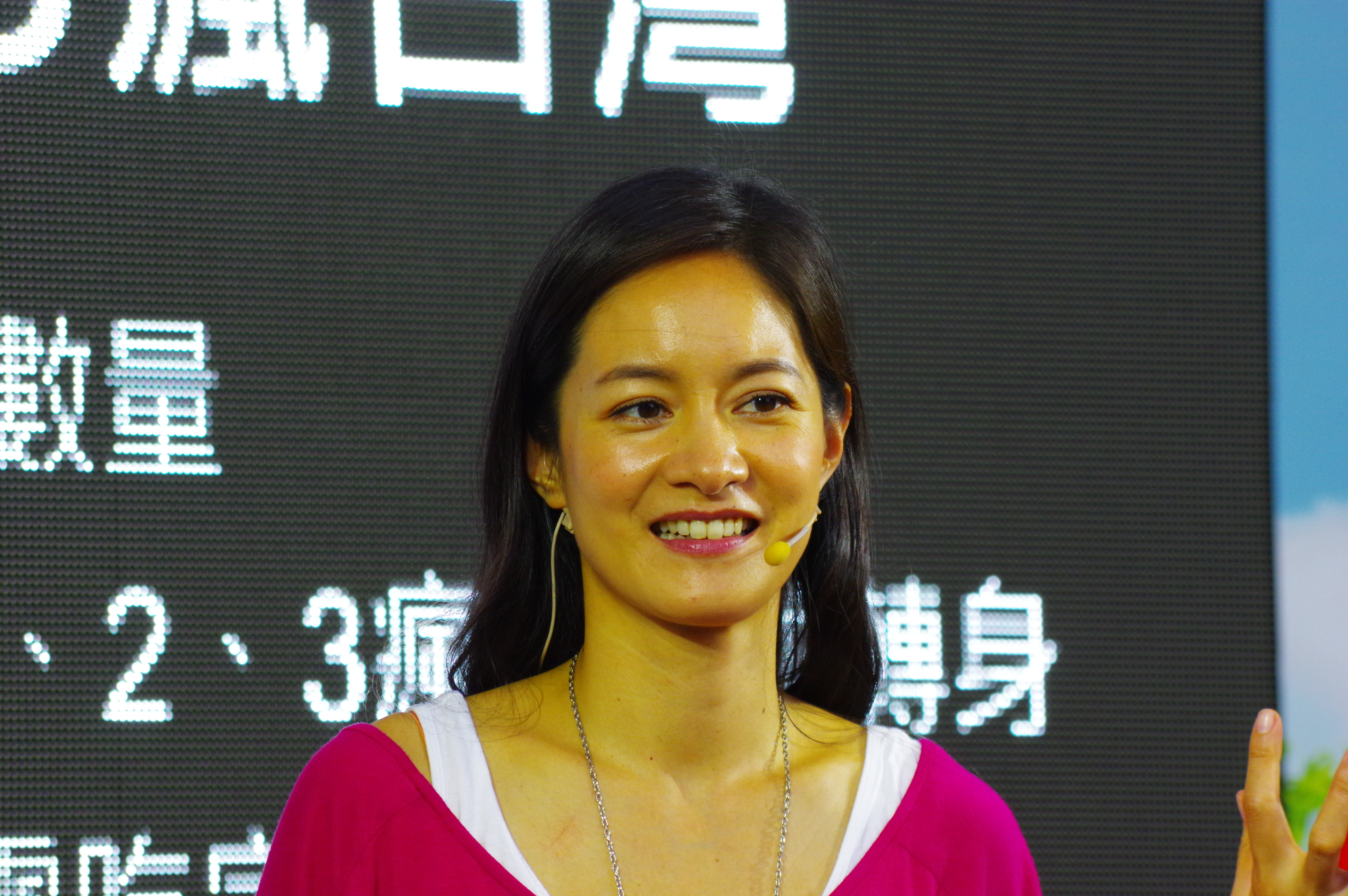 台灣電視節目主持人謝怡芬（Janet Hsieh）